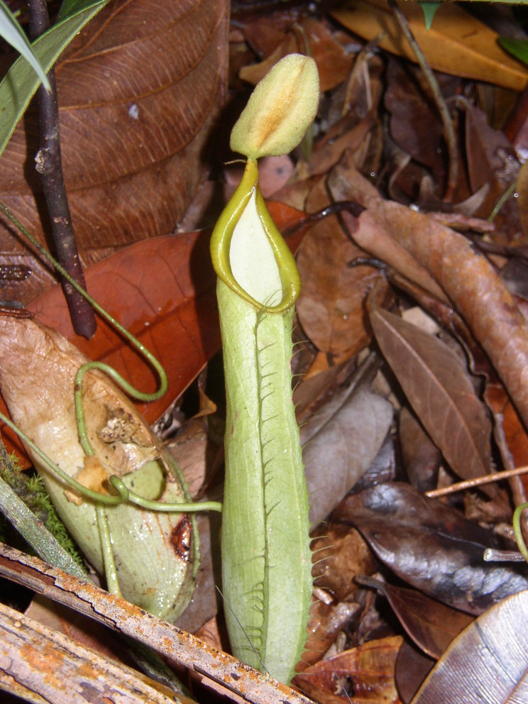 Photo taken in natural habitat.